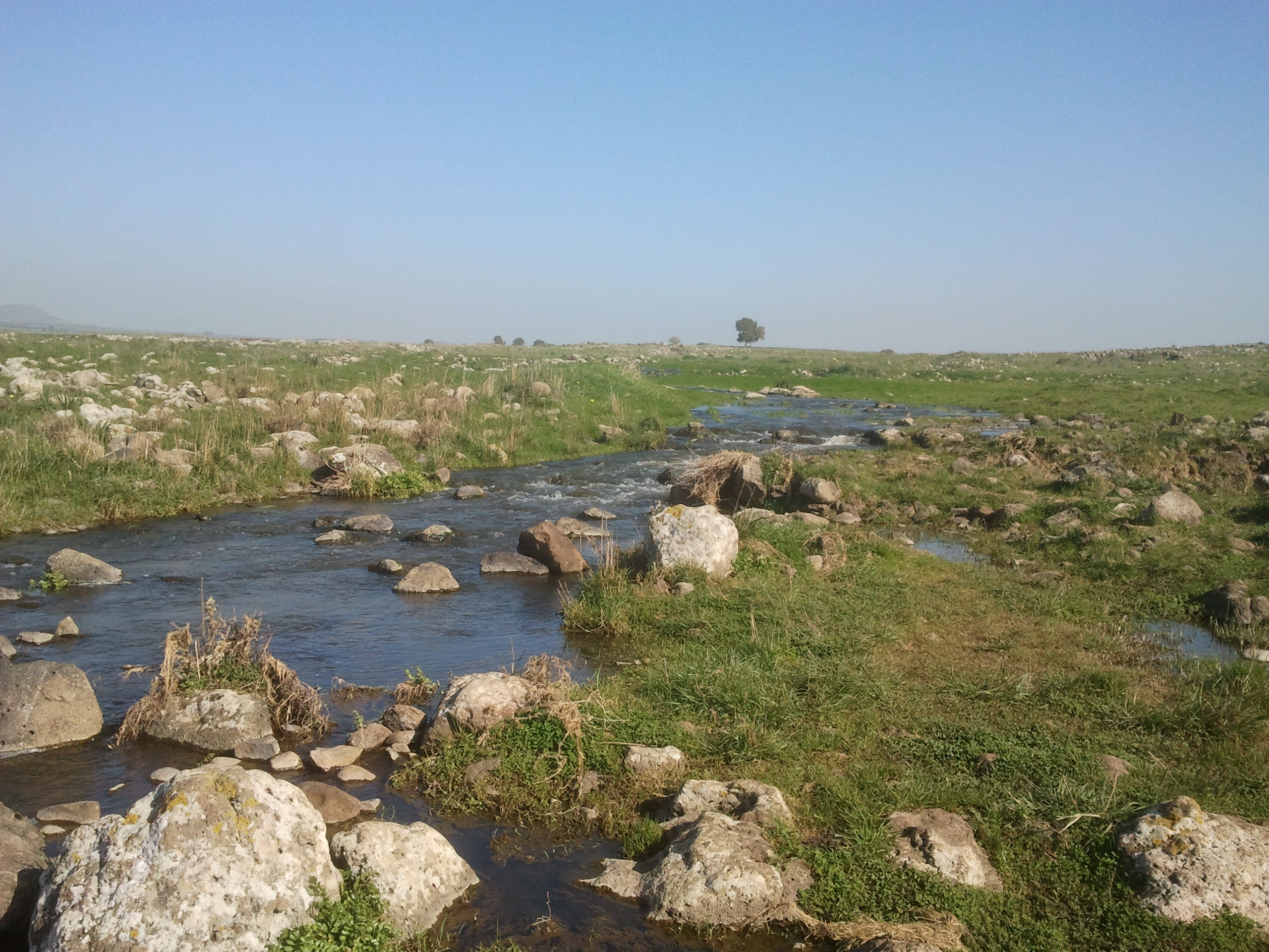 נחל בזלת ליד כביש 808